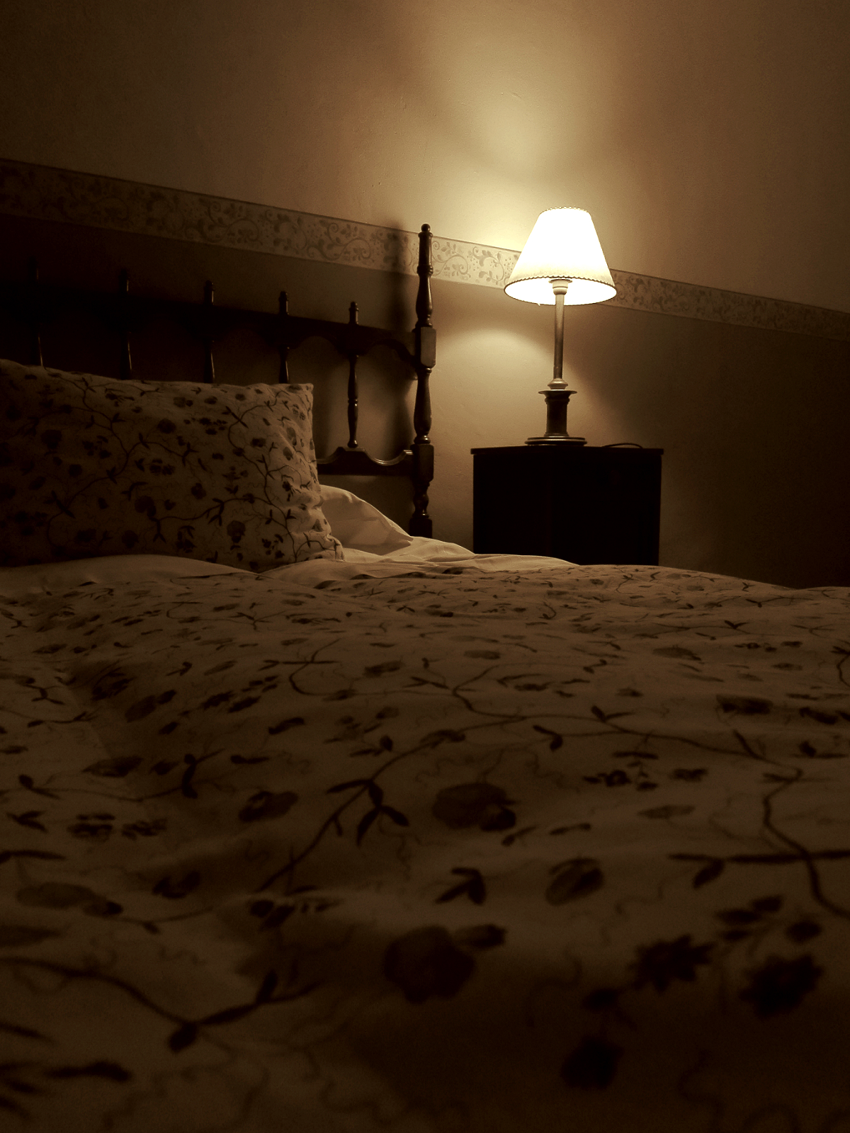 Puigcerdà (Cerdanya, Girona, Espanya) - Cambra de la "Fonda Cerdanya".